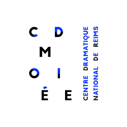 Il s'agit du nouveau logotype de la Comédie, CDN de Reims, créé par la graphiste Julie Linotte